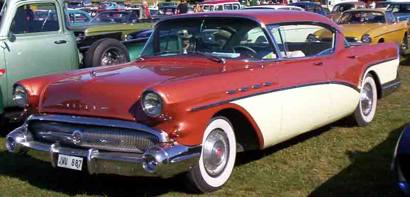 1957 Buick Roadmaster Riviera Series 70 Model 73A 4-door Hardtop